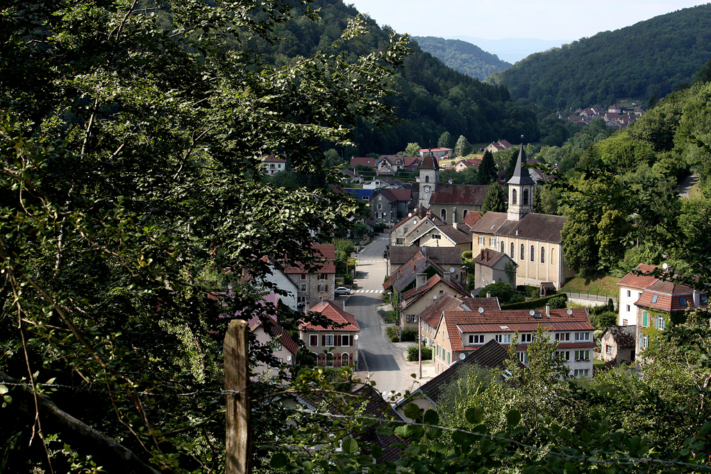 Glay, 25310, Doubs, Franche-Comté, France